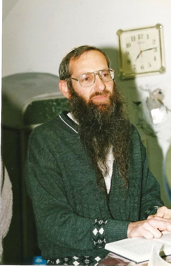 Jerusalem